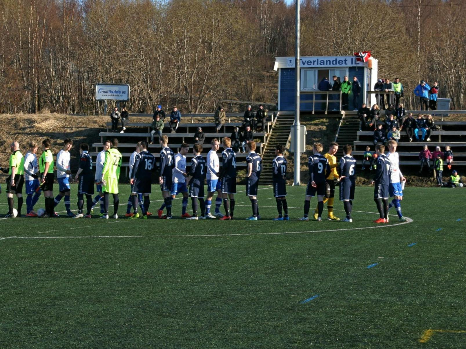 Tverlandet Kunstgressbane